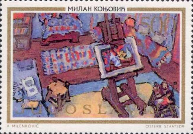 My studio by Milan Konjović